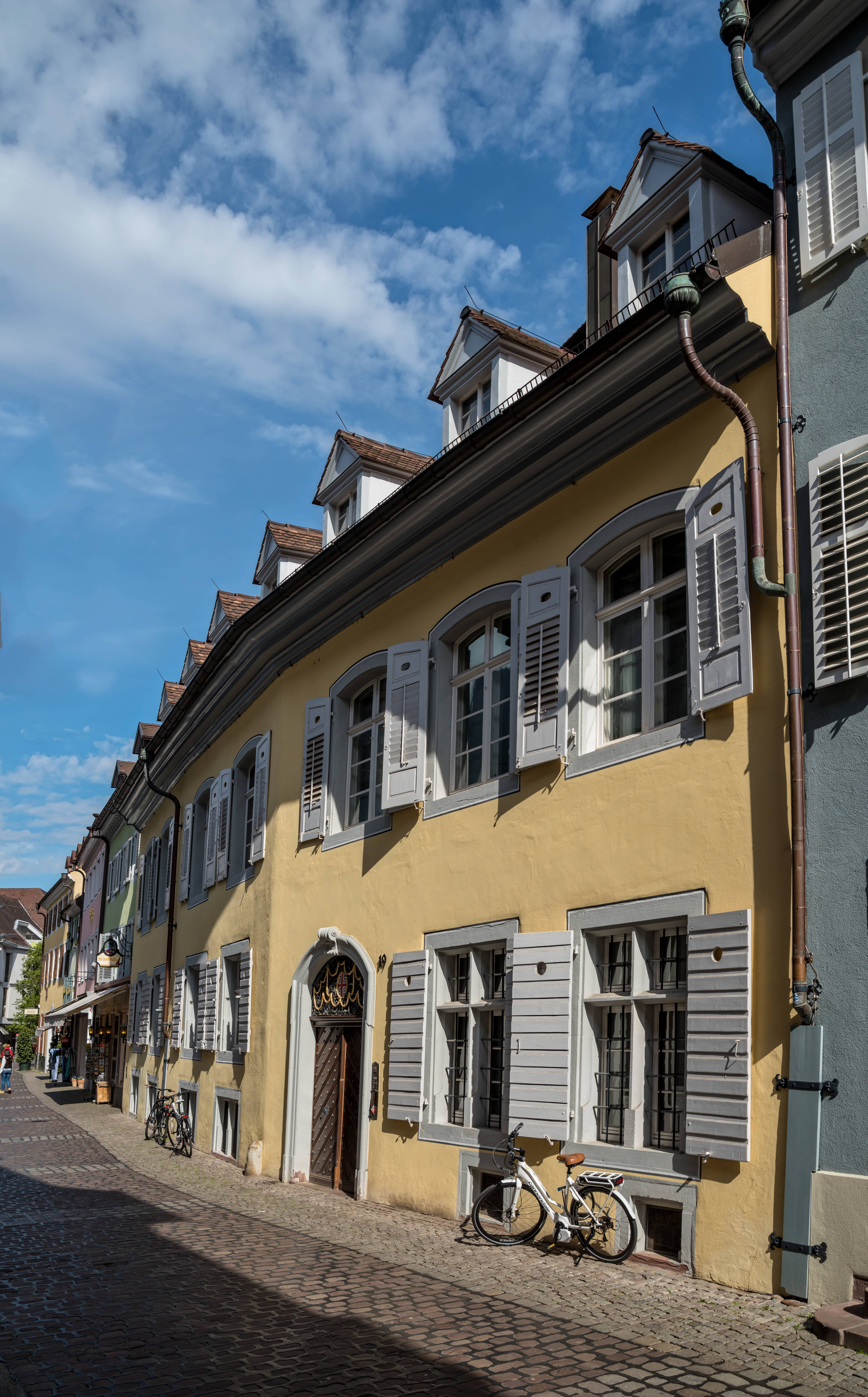 Bilder aus Freiburg im Breisgau Schusterstraße 21 Der ältere Teil des historischen Kaufhauses